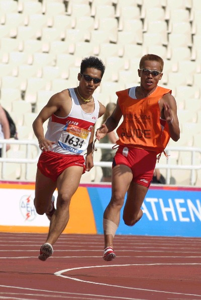 アテネパラリンピックにて伴走（右）